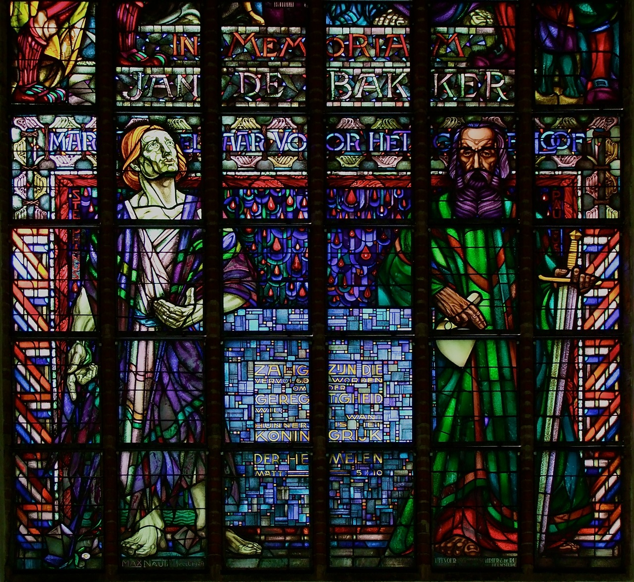 In mei 1525 werd Jan de Bakker op bevel van landvoogdes Margaretha van Oostenrijk (landvoogdes Margaretha van Savoyen) gevangen genomen. Hij werd gevangen gezet in de Voorpoort te 's Gravenhage. Hij werd met tussenpozen van 4 maanden verhoord. In deze verhoren ging hij onder andere in tegen de ongehuwde staat. Hier bekende hij ook zelf in het geheim getrouwd te zijn. Ondertussen is ook zijn vader uit zijn ambt als koster ontzet. Hij zoekt Jan nog op als deze in gevangenschap verkeert. Op 11 september 1525 vond het laatste verhoor plaats. Men probeerde hem nog eenmaal te bekeren van zijn weg. Dit lukte niet waarna hij onderandere door de inquisiteurs Ruard Tapper en Claes Coppijn de Montibus veroordeeld werd. Dit op grond van wiclifitische en luterse ketterijen. Het belangrijkste punt was dat hij zich opstelde volgens de leer van Hinne Rode. Hij verwierp de rooms katholieke sacramenten en ceremoniën. Hij beriep zich hierbij op de Heilige Schrift. (Het gaat hier vooral om het avondmaal. De rooms katholieke kerk heeft de opvatting dat als men het Heilig Avondmaal gebruikt dat het brood en de wijn echt het lichaam en het bloed van Jezus Christus worden. In de Hervormde kerk is dat alleen als symbool.) Op 15 september 1525 werd het vonnis voltrokken op het prinsenhof in 's Gravenhage. Dit in het bijzijn van landvoogdes Margaretha van Savoyen en vele andere hoogwaardigheidsbekleders. Het vonnis luidde "te povre toe gebrant zulcx dat van hem geene memorie meer zij." Hij werd gewurgd en verbrand. Een stalen band om zijn hals werd aangetrokken terwijl het vuur brandde. Een kruitzakje op zijn borst maakte een einde aan zijn leven. Dit terwijl zijn medegevangenen in de Gevangenpoort psalm 31 of het Te Deum zongen. Glasraam ontworpen door Max Nauta info